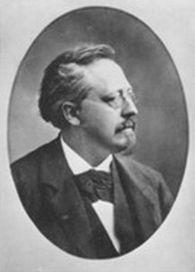 Foto van J.P.N. Land